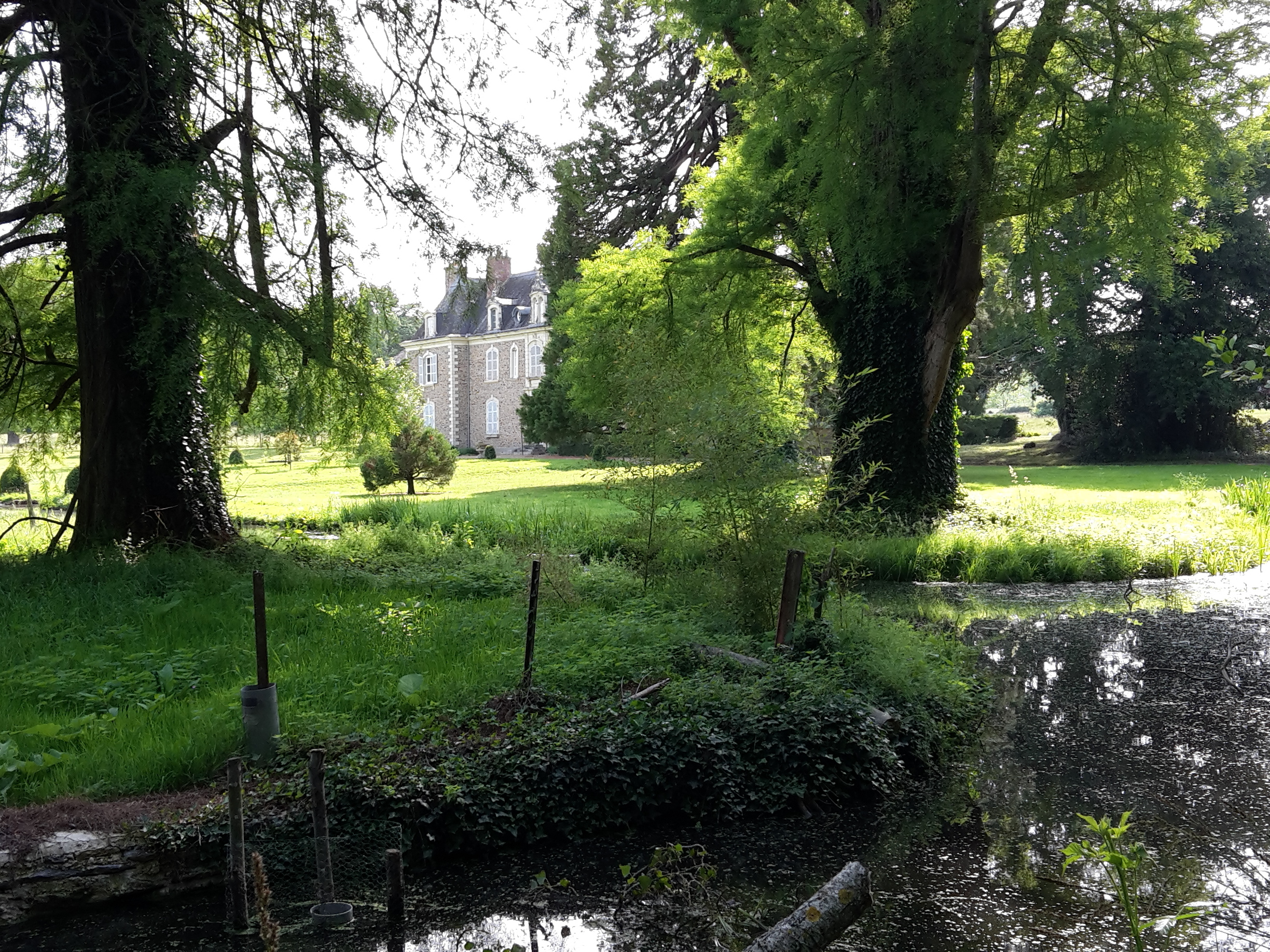 Le château de Vallière à Loiré, Maine-et-Loire, France.